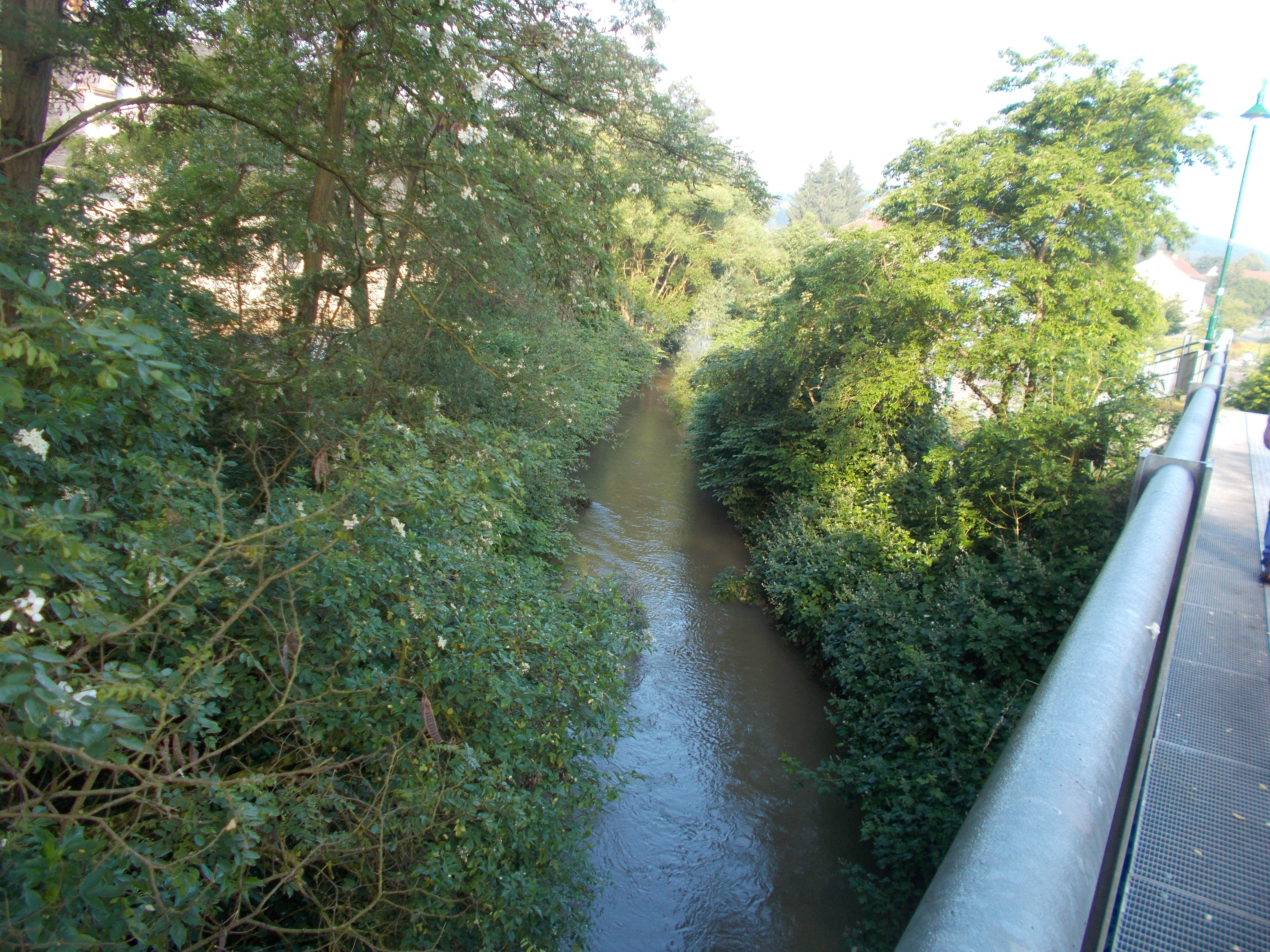 Kuselbach an der Kuseler Brücke nahe dem Bahnhof